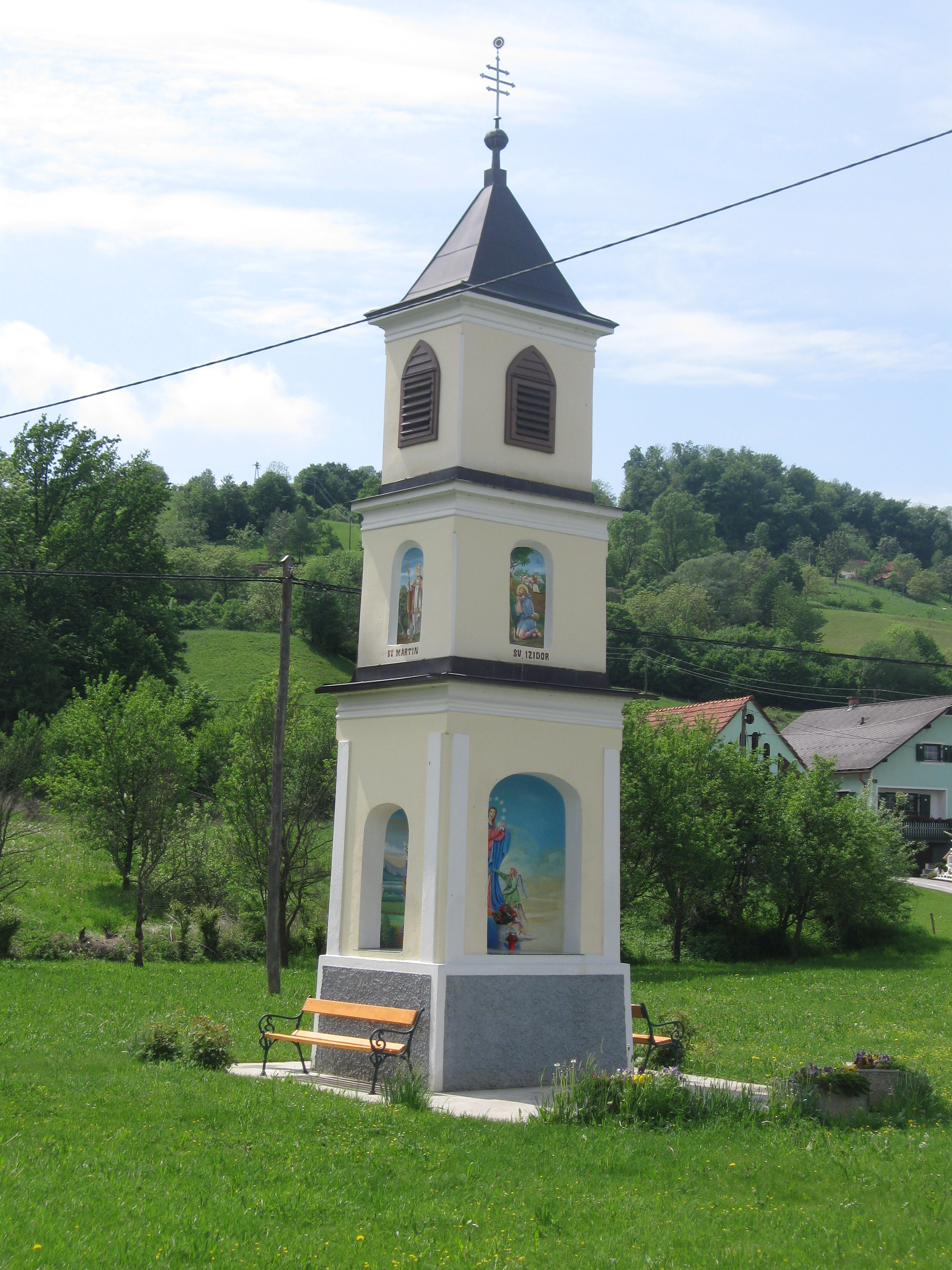 Trinadstropno znamenje - zvonik iz okoli 1900 je zidano na kvadratni osnovi in se stopniščasto manjša proti vrhu. Spodnji dve etaži sta razčlenjeni z nišami.